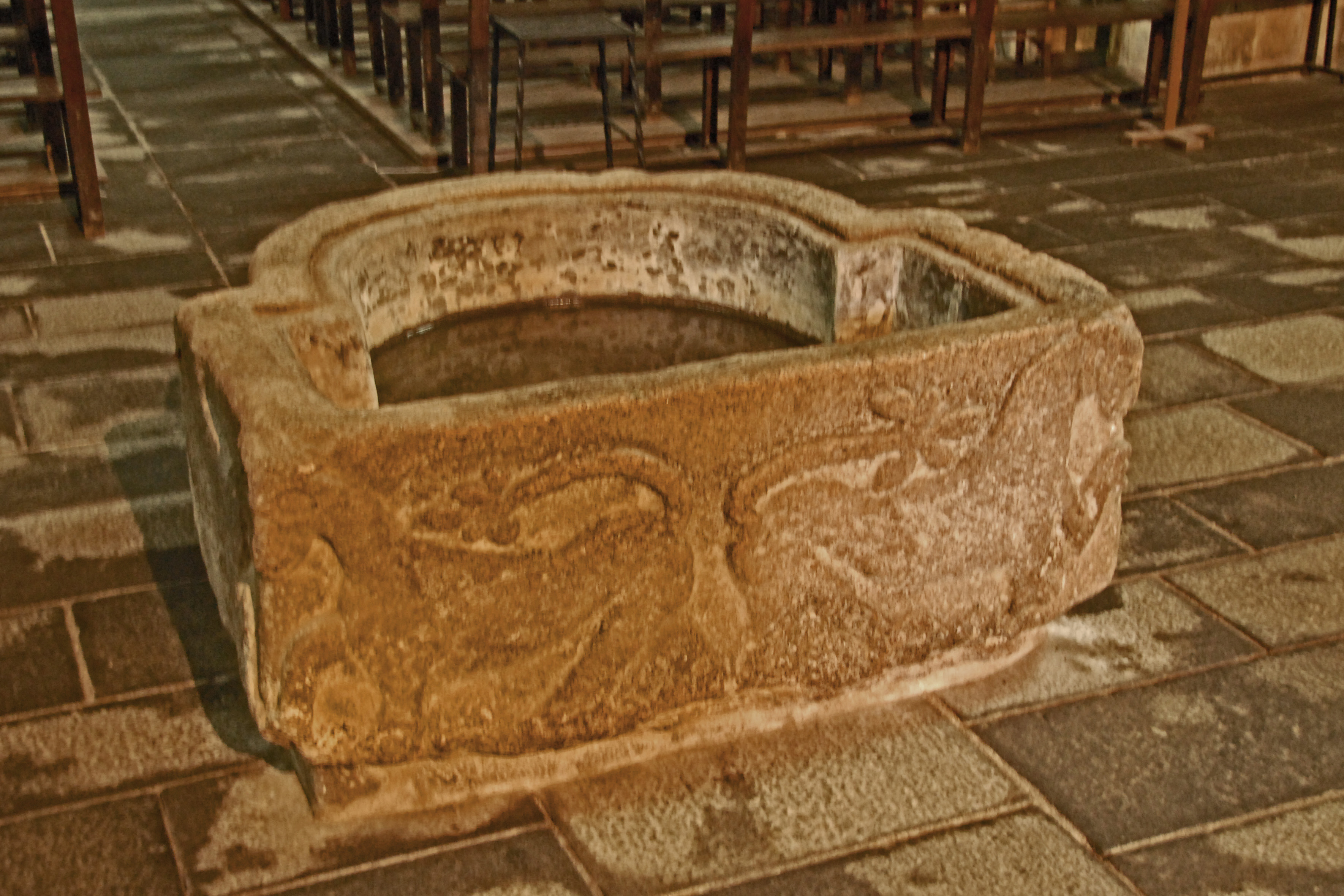 St-Pierre de Le Dorat, karolingisches Taufbecken